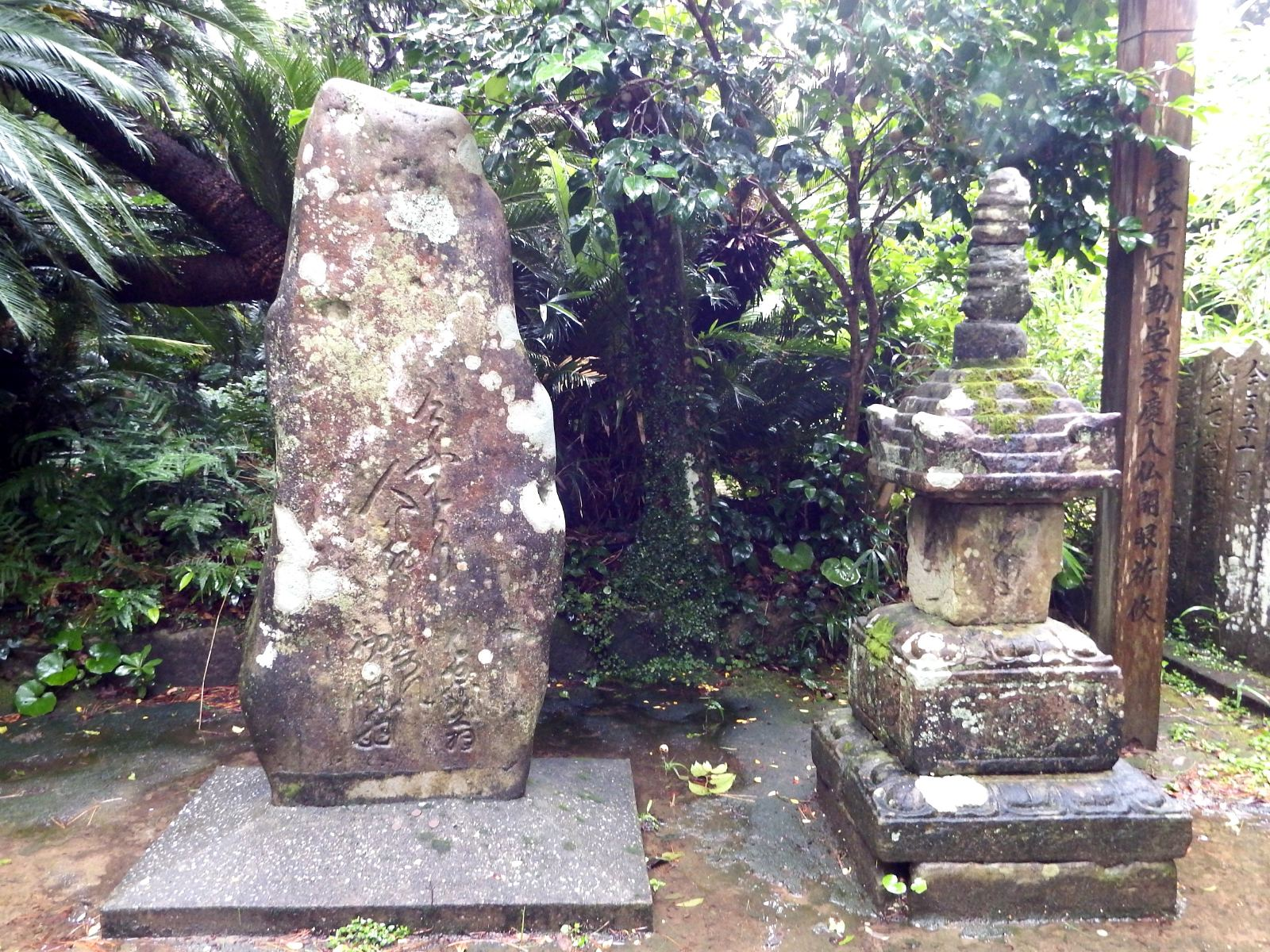 金剛福寺の芭蕉句碑